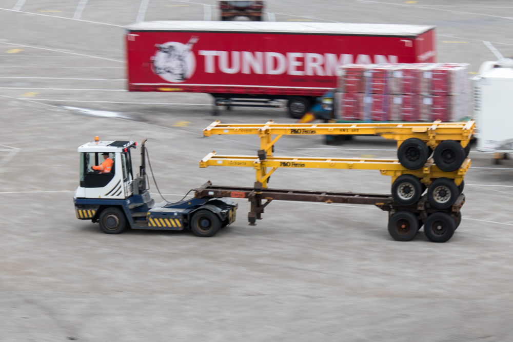 Terminal tractor am Fährterminal Rotterdam